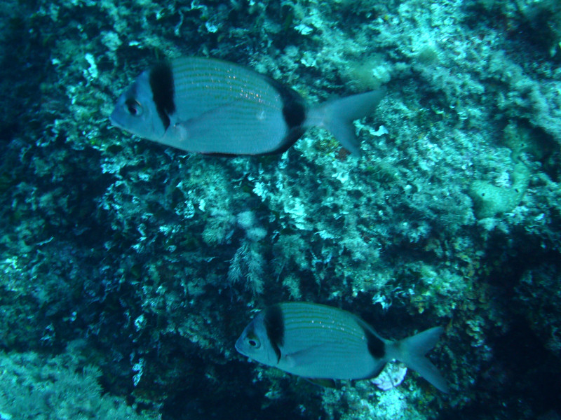 Diplodus vulgaris, Portofino, Italy